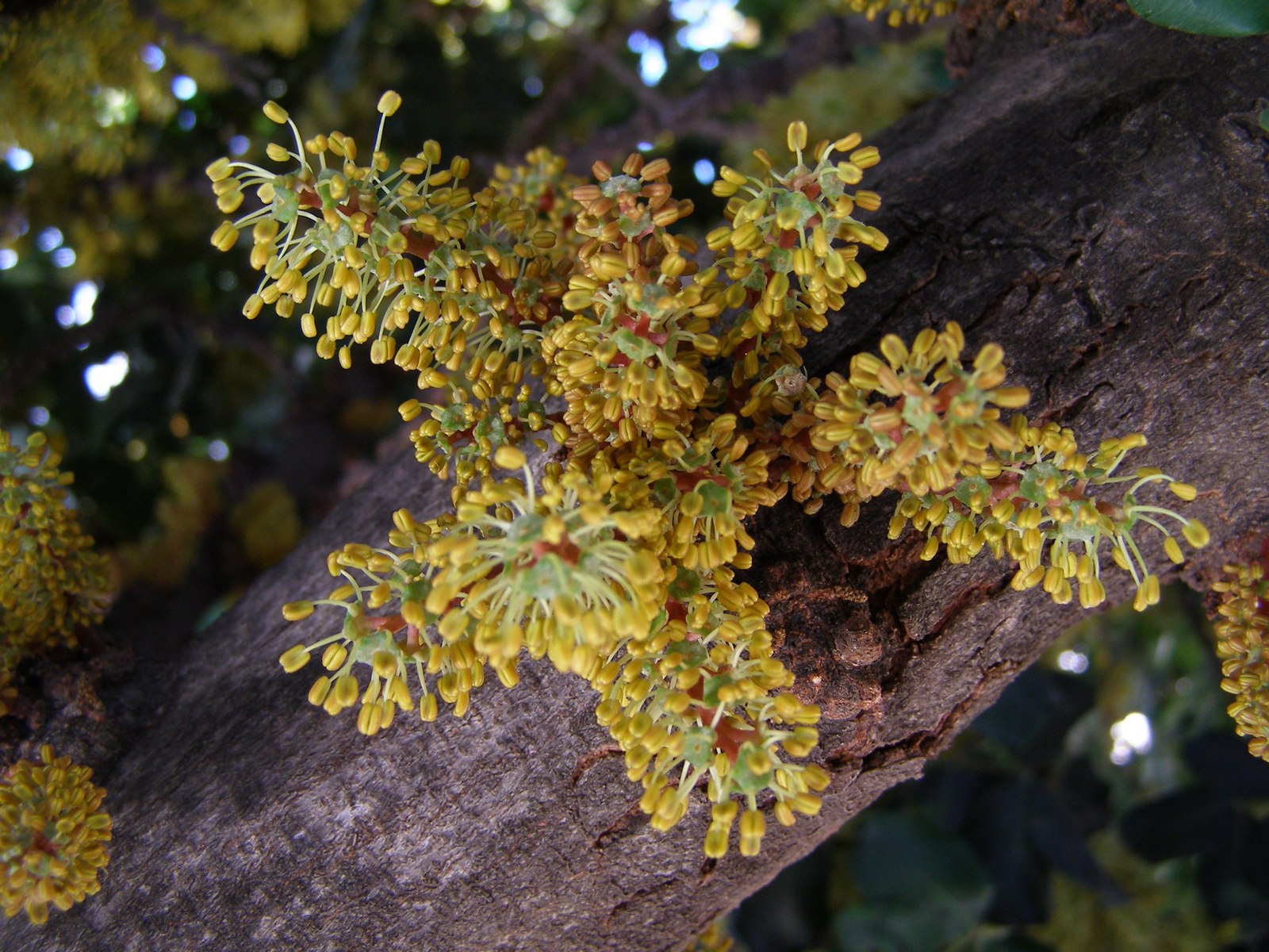 Blüten eines Johannesbrotbaumes